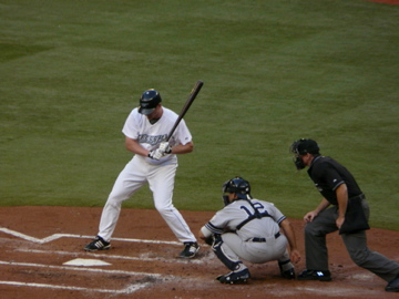 Lyle Overbay 19:26, 6 September 2008 . . DinoZon . . 360×270 (46 KB)